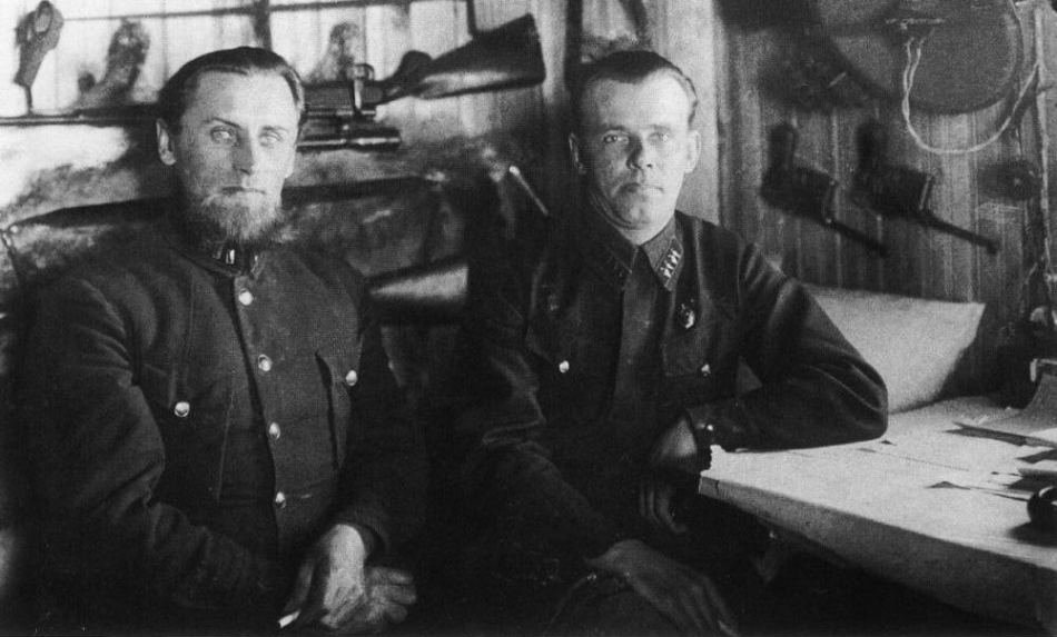 Ф. И. Эйхманс и его заместитель Э. П. Ская.